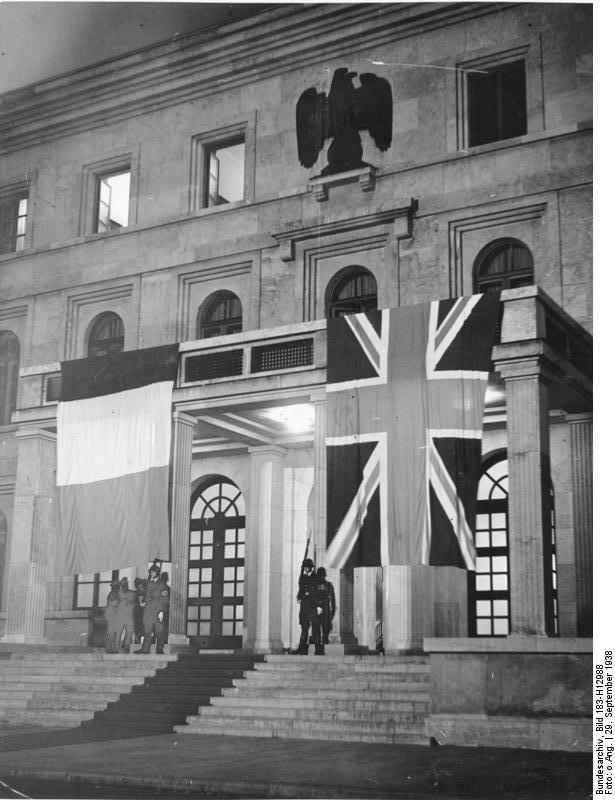 ADN-ZB/ Archiv 29.9.1938 Zum Viermächte-Abkommen in München am 29.9.1938 UBz.: Das mit der englischen und der französischen Flagge geschmückte Gebäude auf dem Königlichen Platz in München, in dem die Begegnung zwischen Adolf Hitler, dem italienischen Regierungschef Benito Mussolini, dem britischen Premierminister Chamberlain und dem französischen Ministerpräsidenten Daladier stattfindet. [Scherl Bilderdienst]